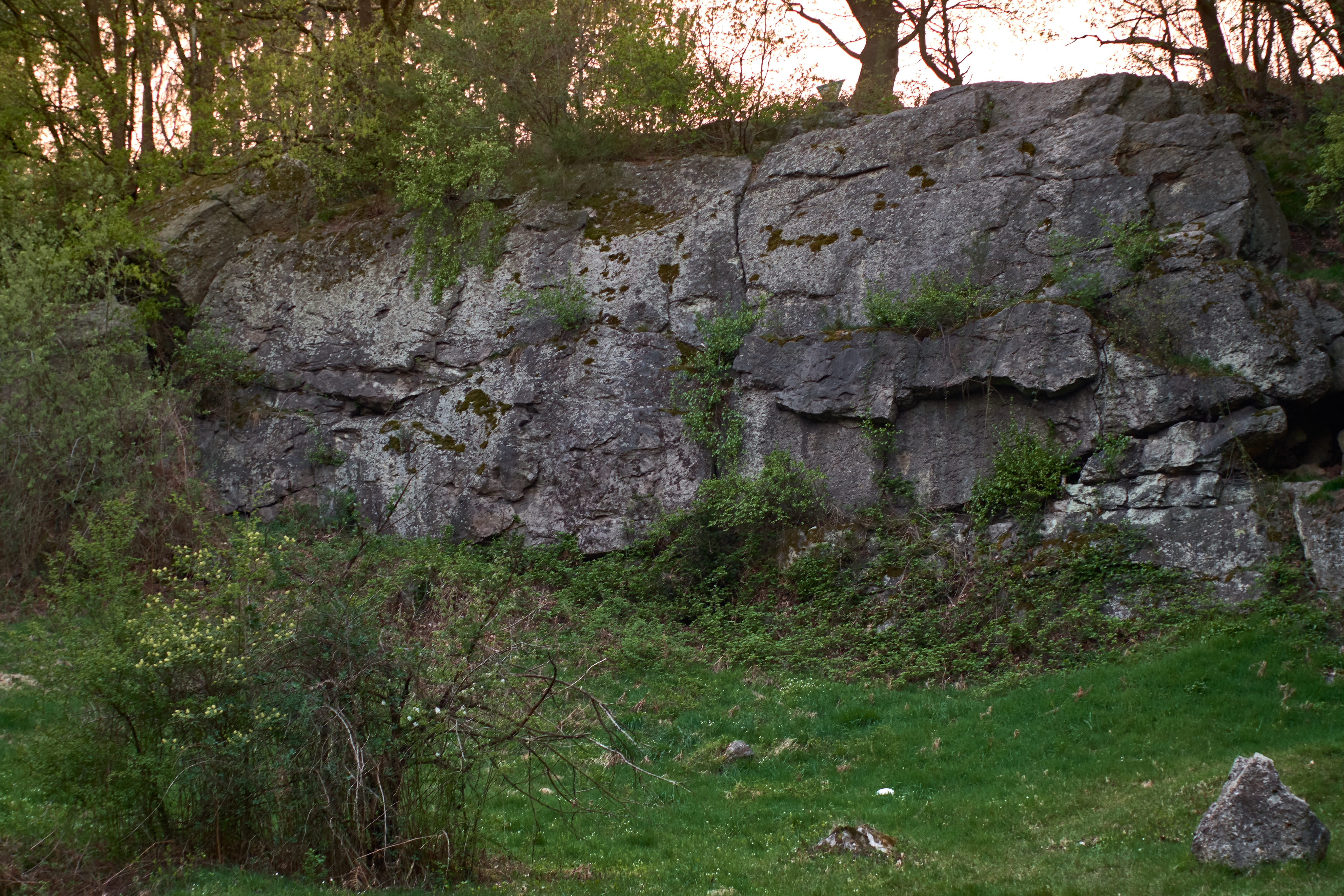 Die sogenannten Tatternsteine im Naturschutzgebiet Gedau